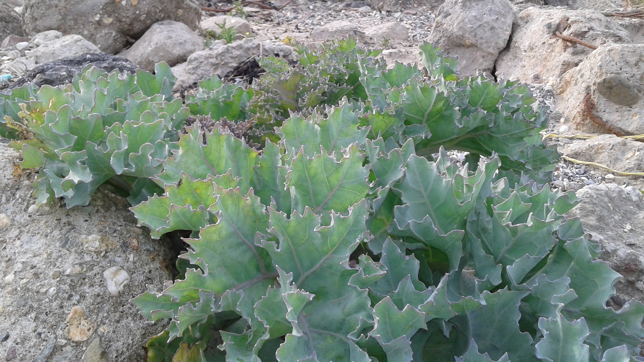 Crambe maritima 59140 digue du break